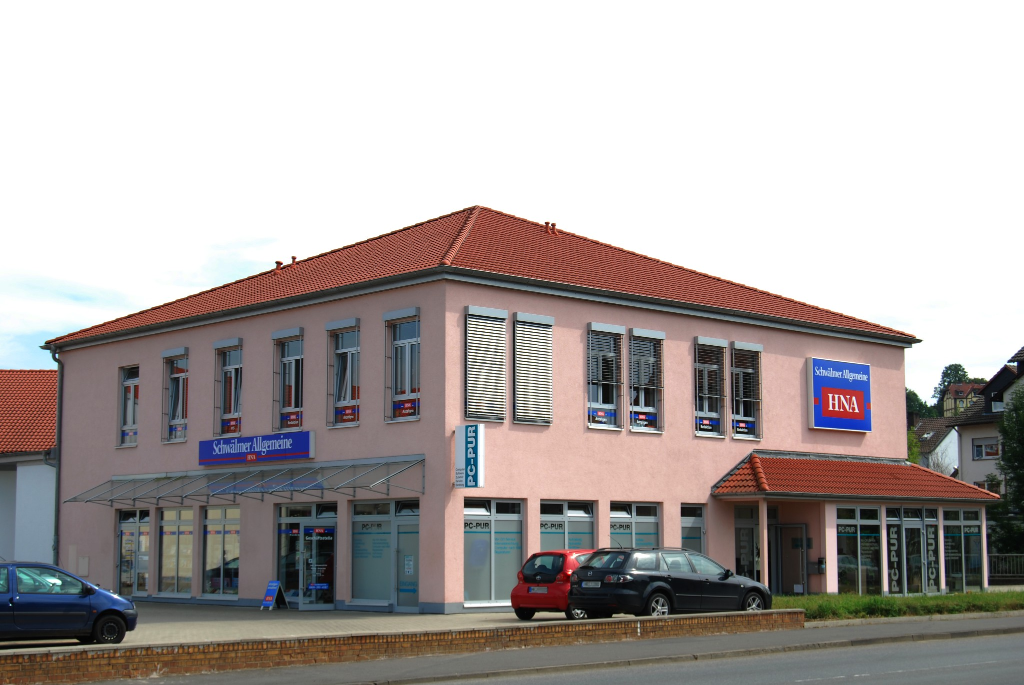 Gebäude der HNA in Schwalmstadt (Schwälmer Allgemeine)